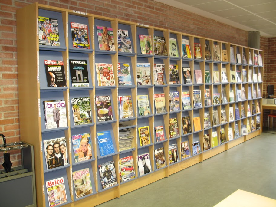 Hemeroteca de la Biblioteca Nodal de Lugo